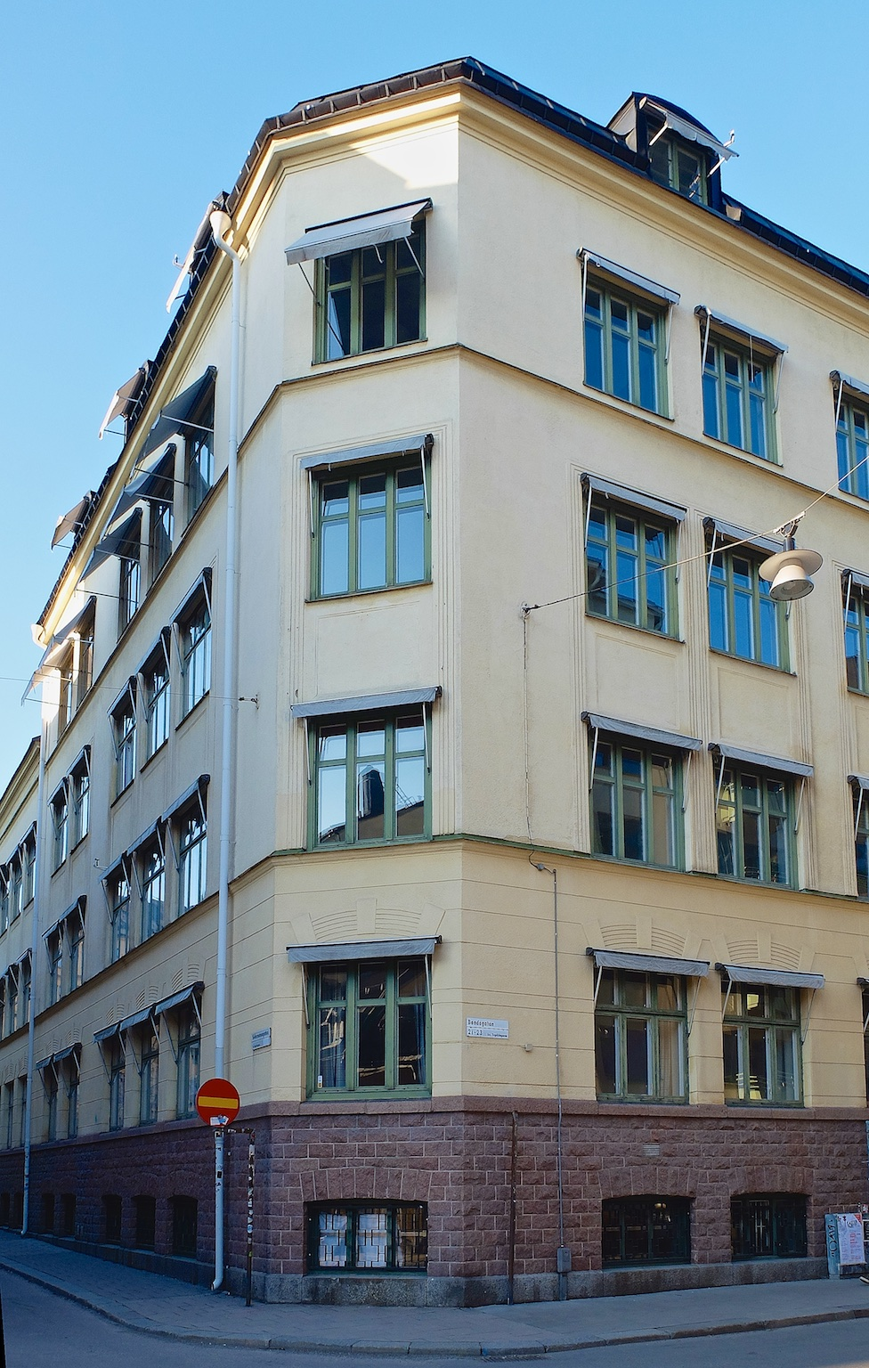 Husets entré ligger på Bondegatan 21A